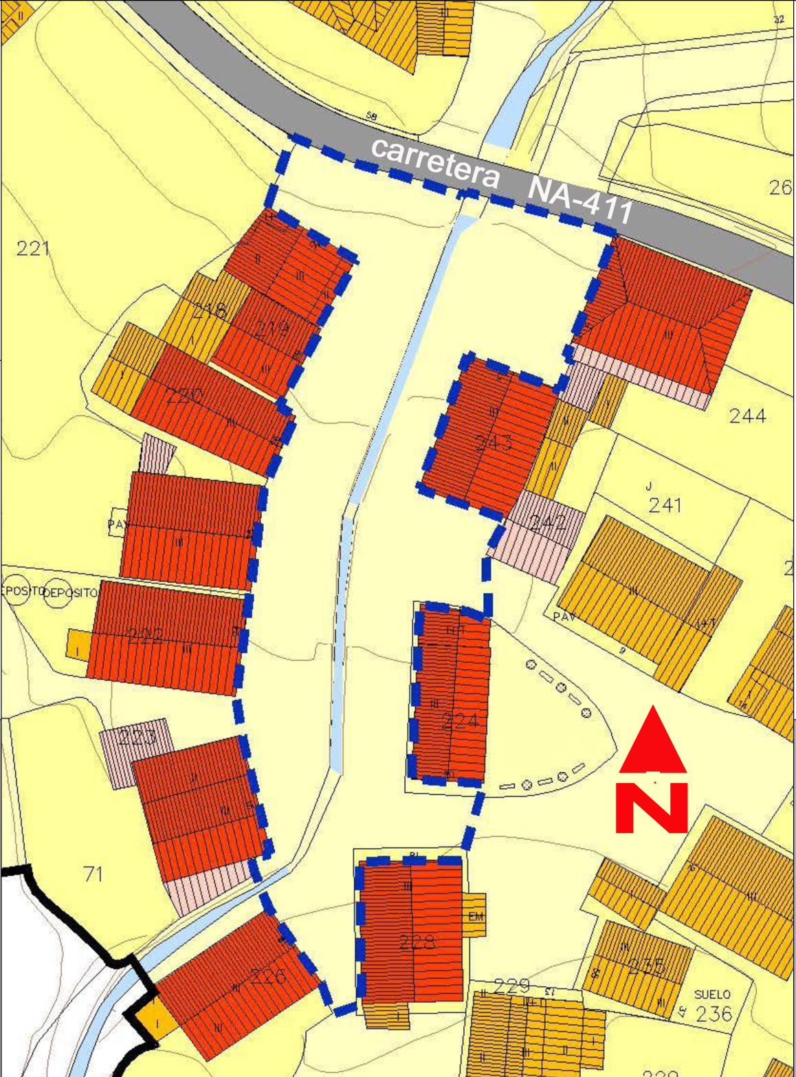 Espacio alrededor de una regata canalizada en Auza (Ulzama)